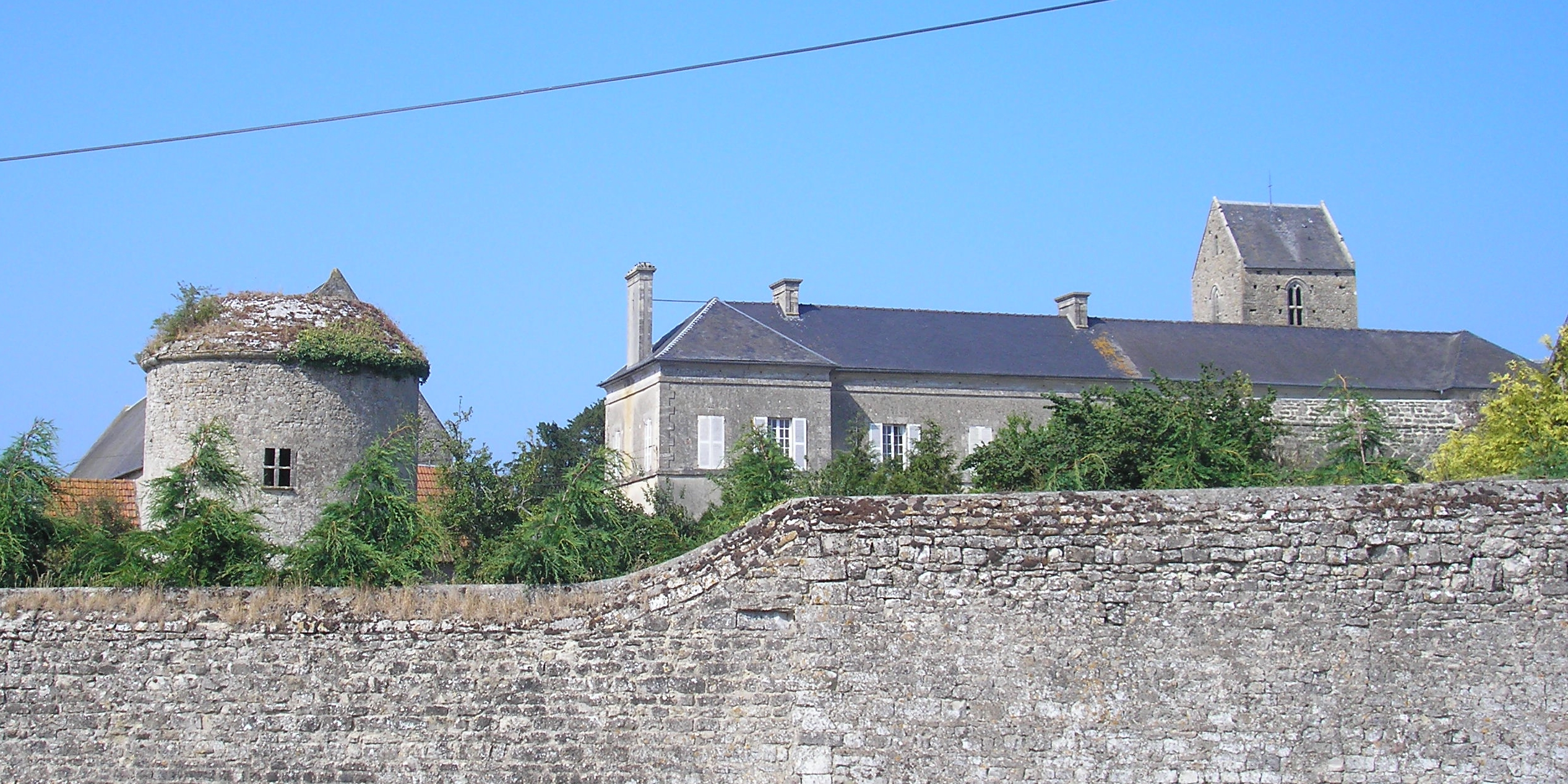 Deux-Jumeaux (Normandie, France). Bâtiments du prieuré.